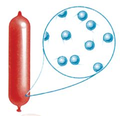 Գազային նյութը և նրա մասնիկները